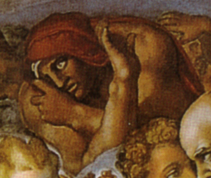 MICHELANGELO Buonarroti Last Judgment Fresco, 1370 x 1220 cm Cappella Sistina, Vatican